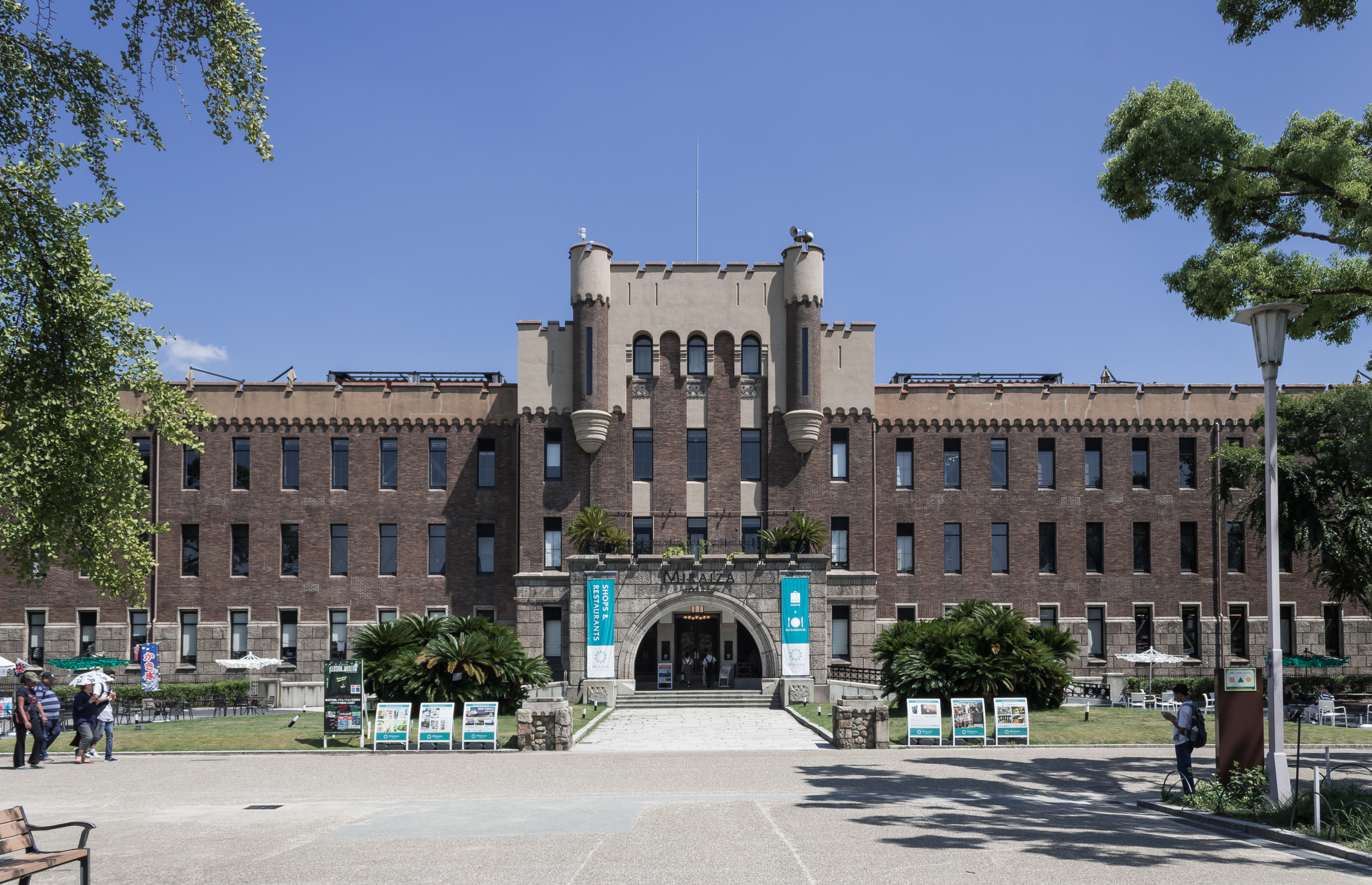 旧大日本帝国陸軍第四師団司令部庁舎（現ミライザ大阪城）